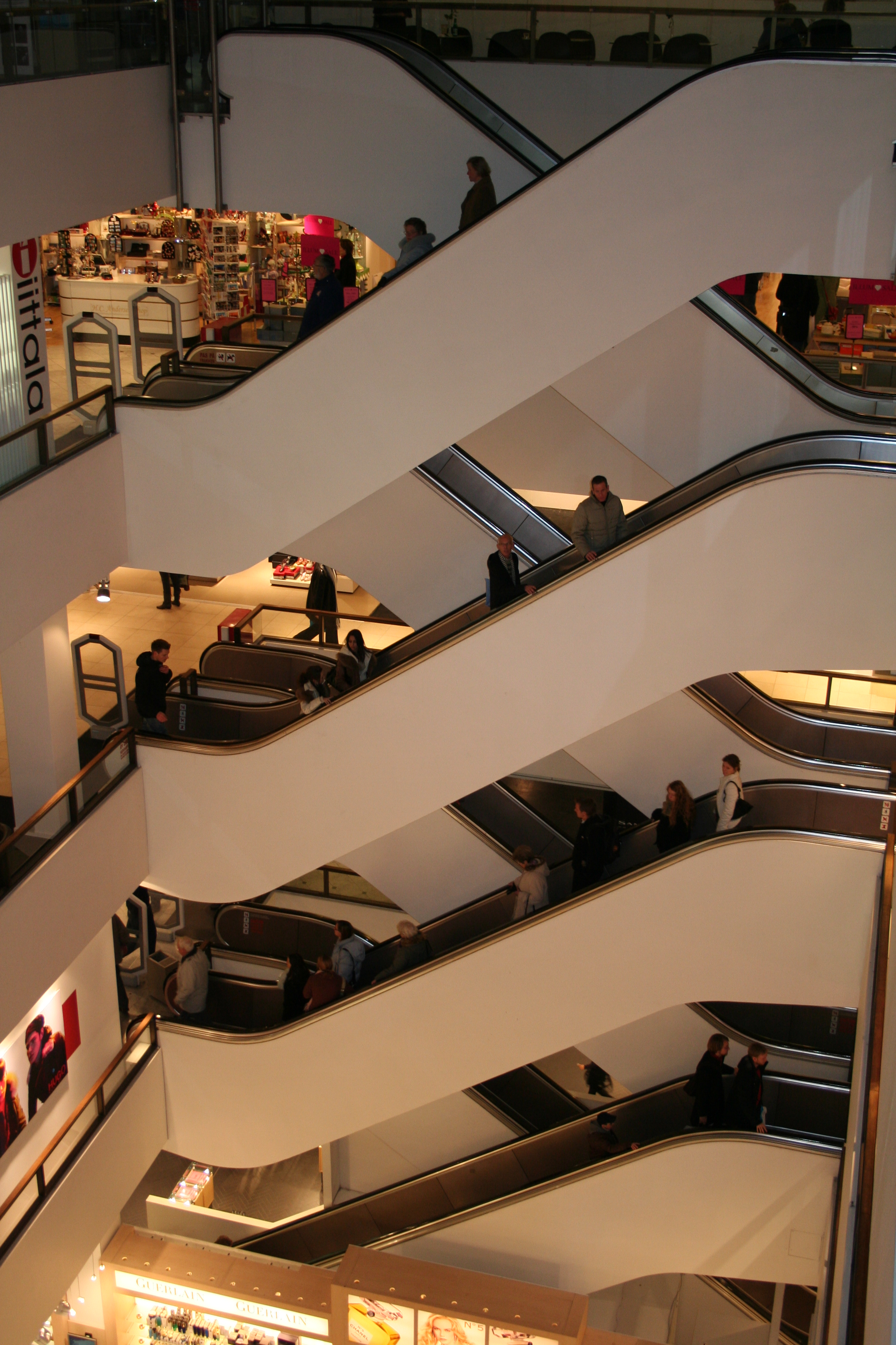 ILLUM - NOT Magasin